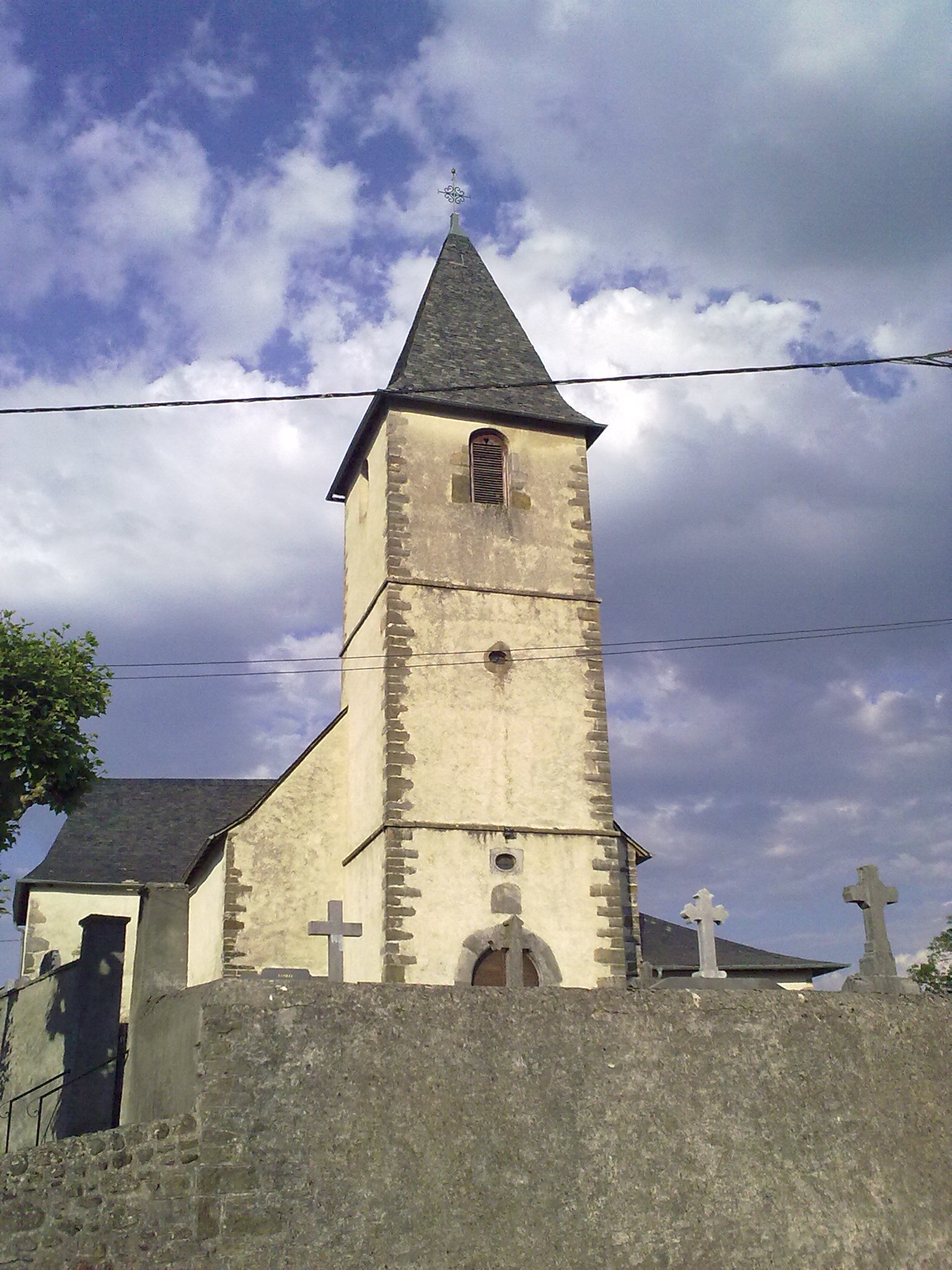 Herrère le 24 mai 2010. France.